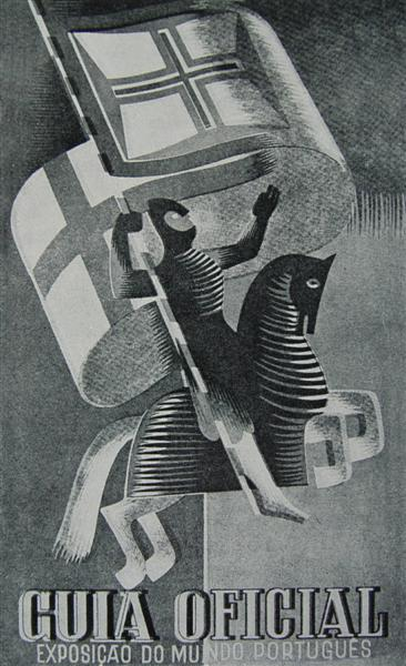 Capa do Guia oficial da Exposicao mundo portugues 1940.